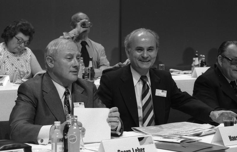 Außerordentlicher Parteitag der SPD in der Westfalenhalle Dortmund